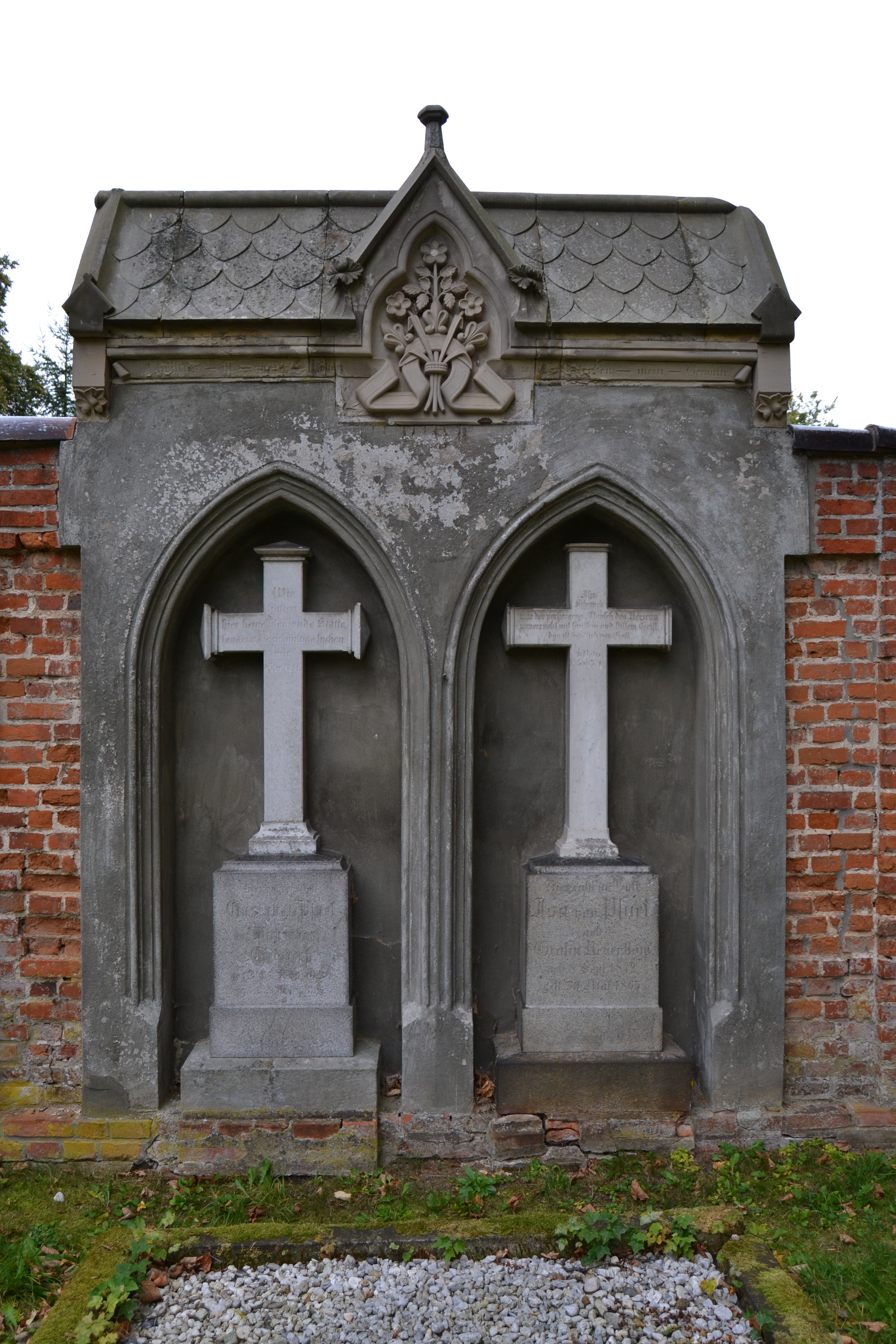 Dorfkirche und Kirchfriedhof von Wilkendorf, Wilkendorf/Altlandsberg.